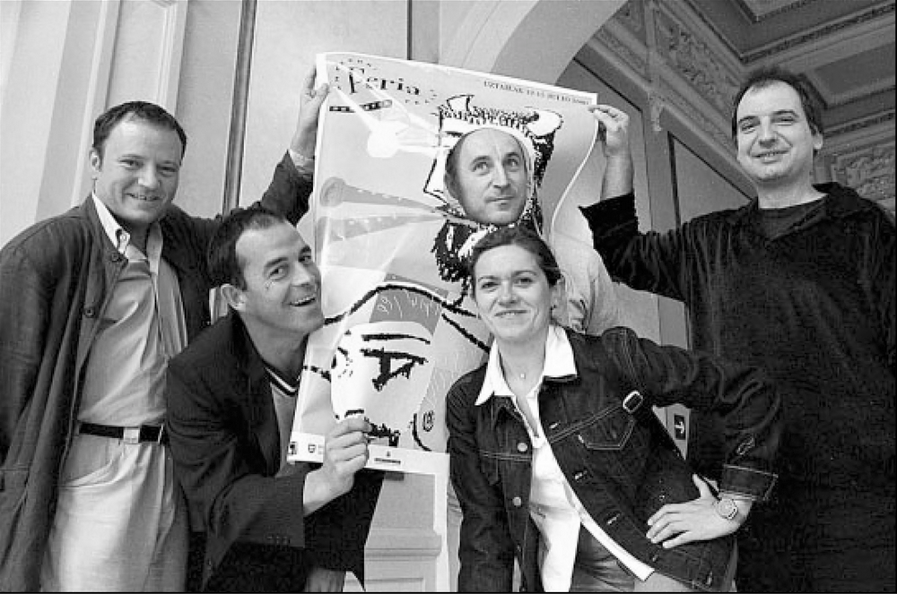 Eneko Olasagasti, Joseba Apaolaza, Paco Mir, Mireia Gabilondo eta Fernando Bernues, Viktoria Eugenia antzokian,'Ez da hain erraza' lanaren aurkezpenean (2000-07-14, Gari Garaialde)